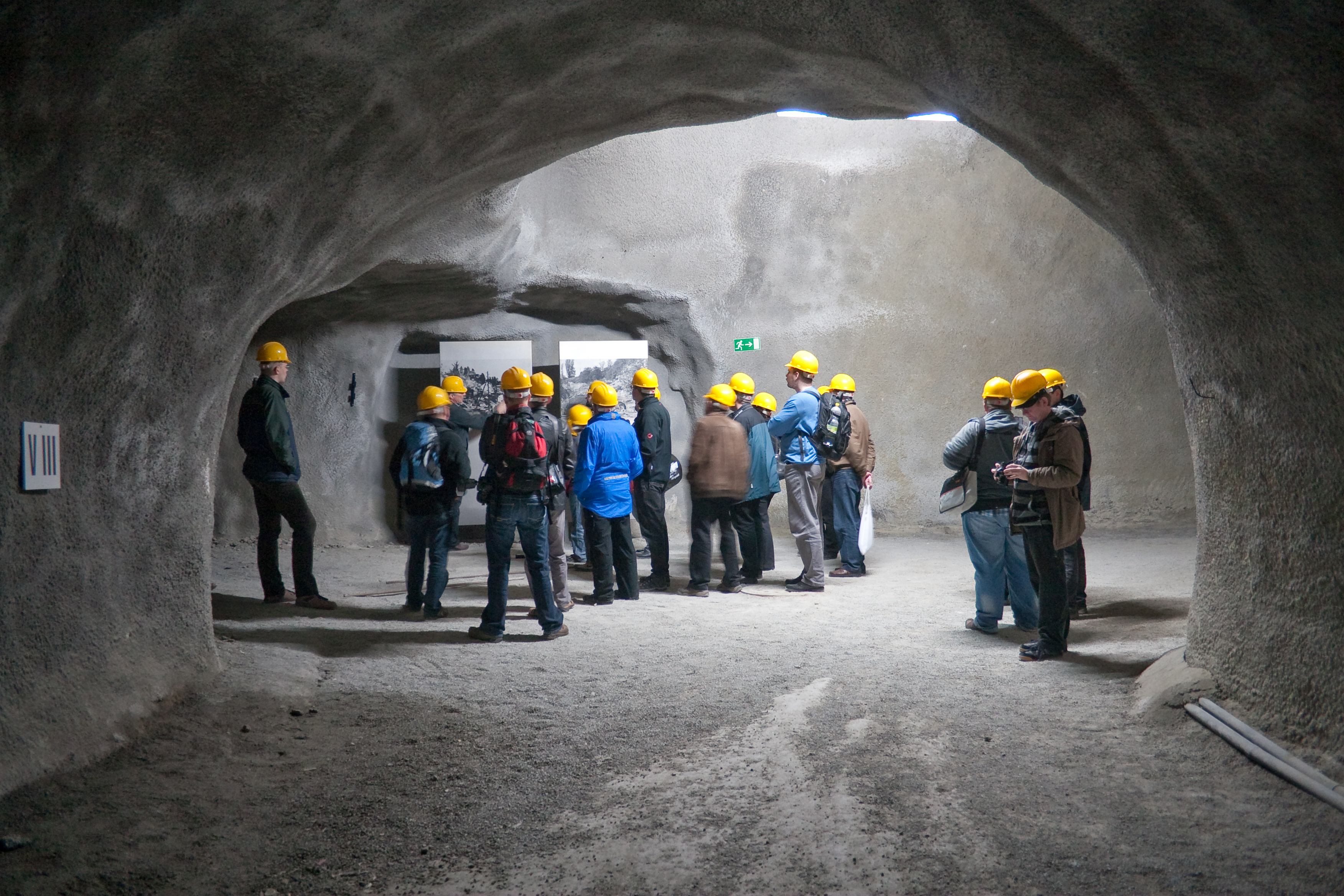 Goldbacher Stollen, Überlingen, Baden-Württemberg, Germany